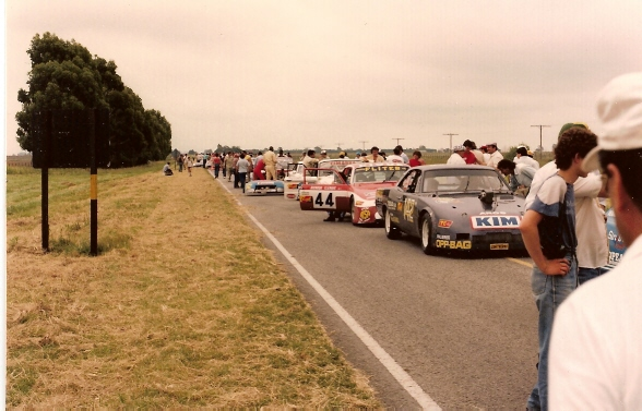 Largada Turismo Carretera, cuando las carreras eran en ruta. Es el Gran Premio del año 1986. Se corrió en La Pampa durante 4 días.